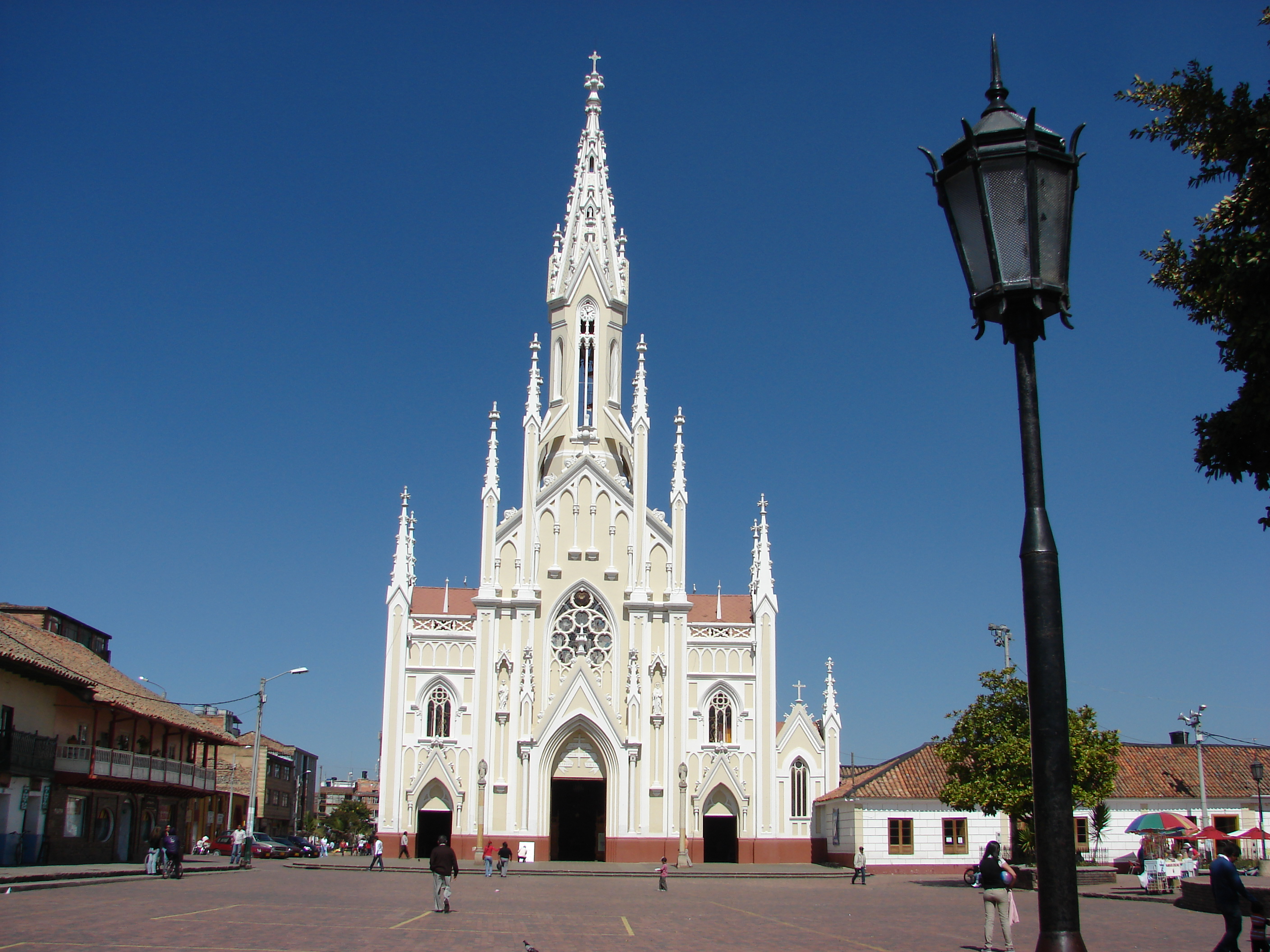 Exterior Basílica Menor. Ubaté-Cund. A Pulido-Villamarín